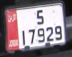 kentekenplaat Jordanië 4